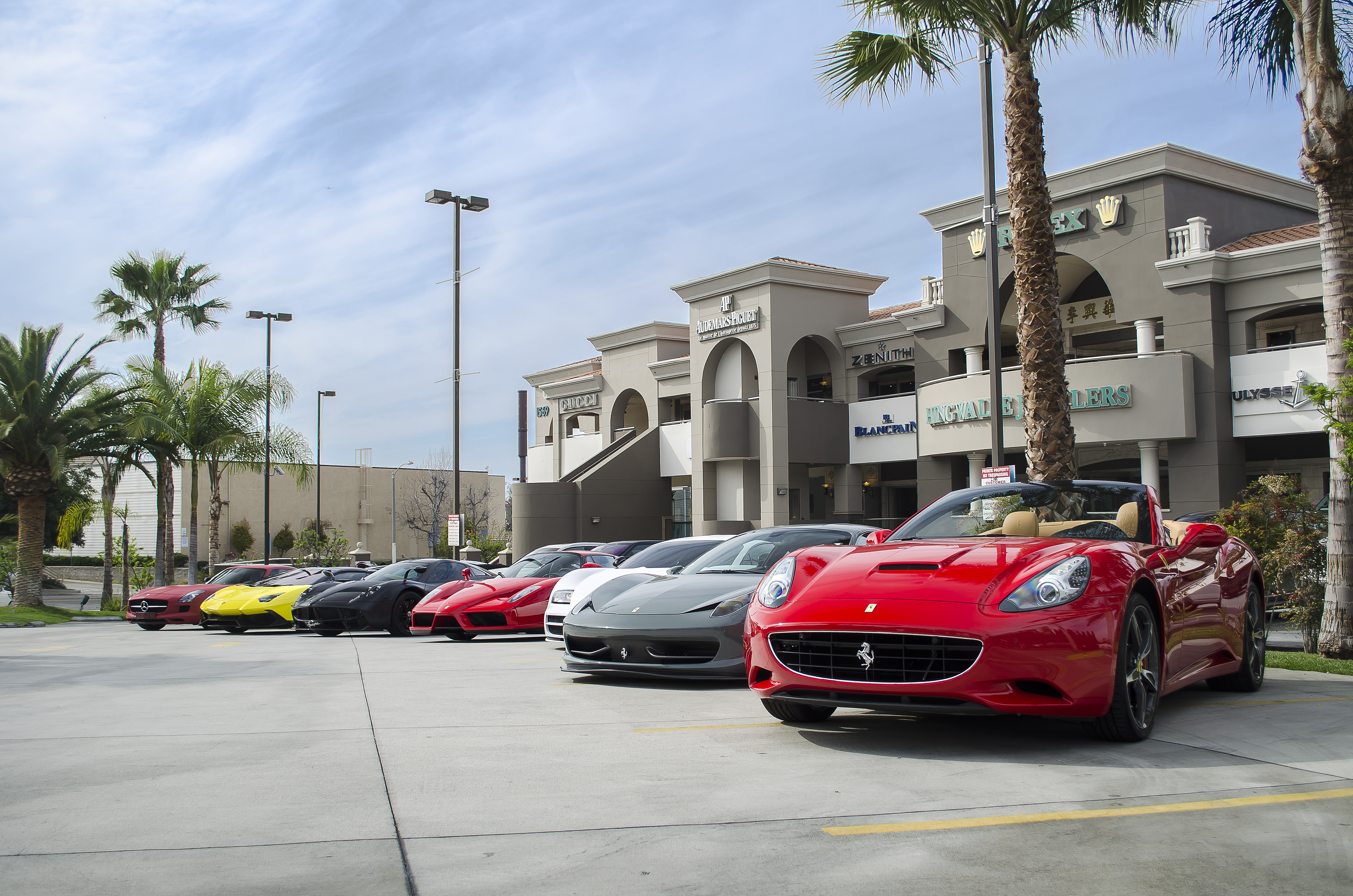 Supercar Lineup